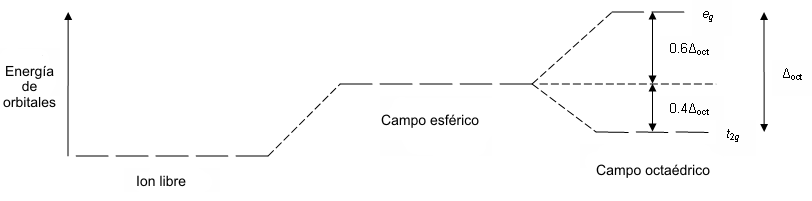 Diagrama de la separación energética de orbitales en un complejo octaédrico